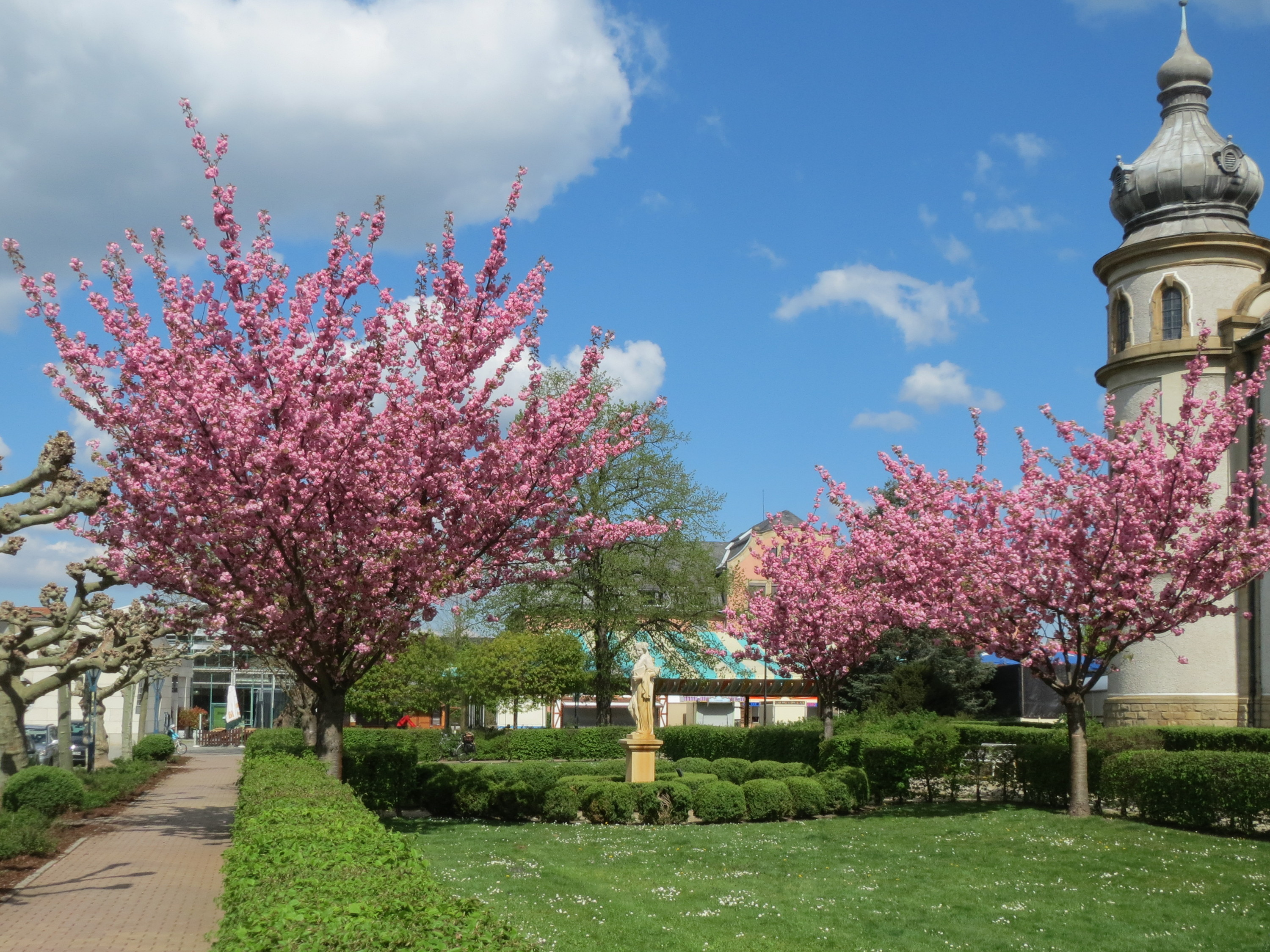 Blüte der Japanischen Zierkirsche (Prunus serrulata) in Hockenheim